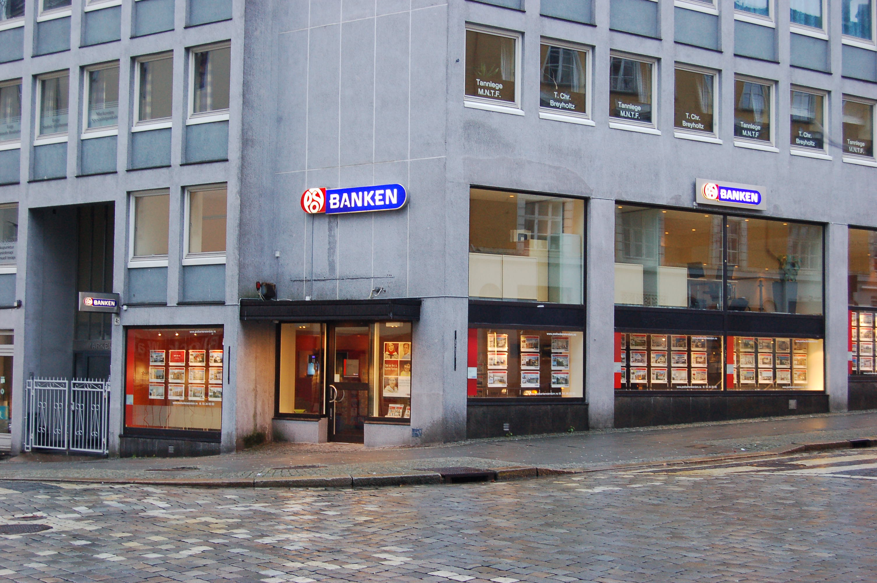 Postbanken outlet in downtown Bergen, Norway